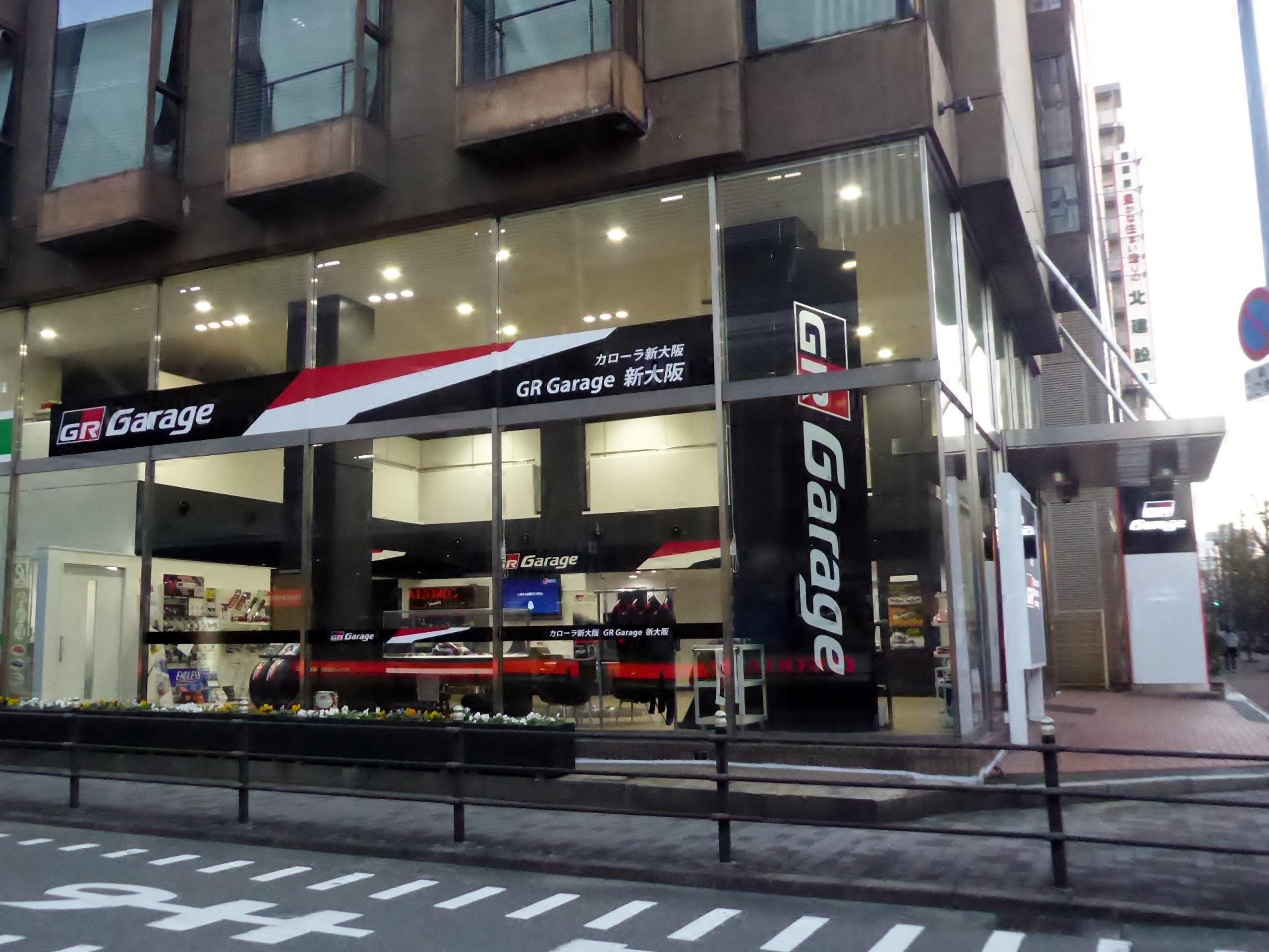 GRガレージ新大阪を撮影。 Panasonic Lumix DMC-TZ60